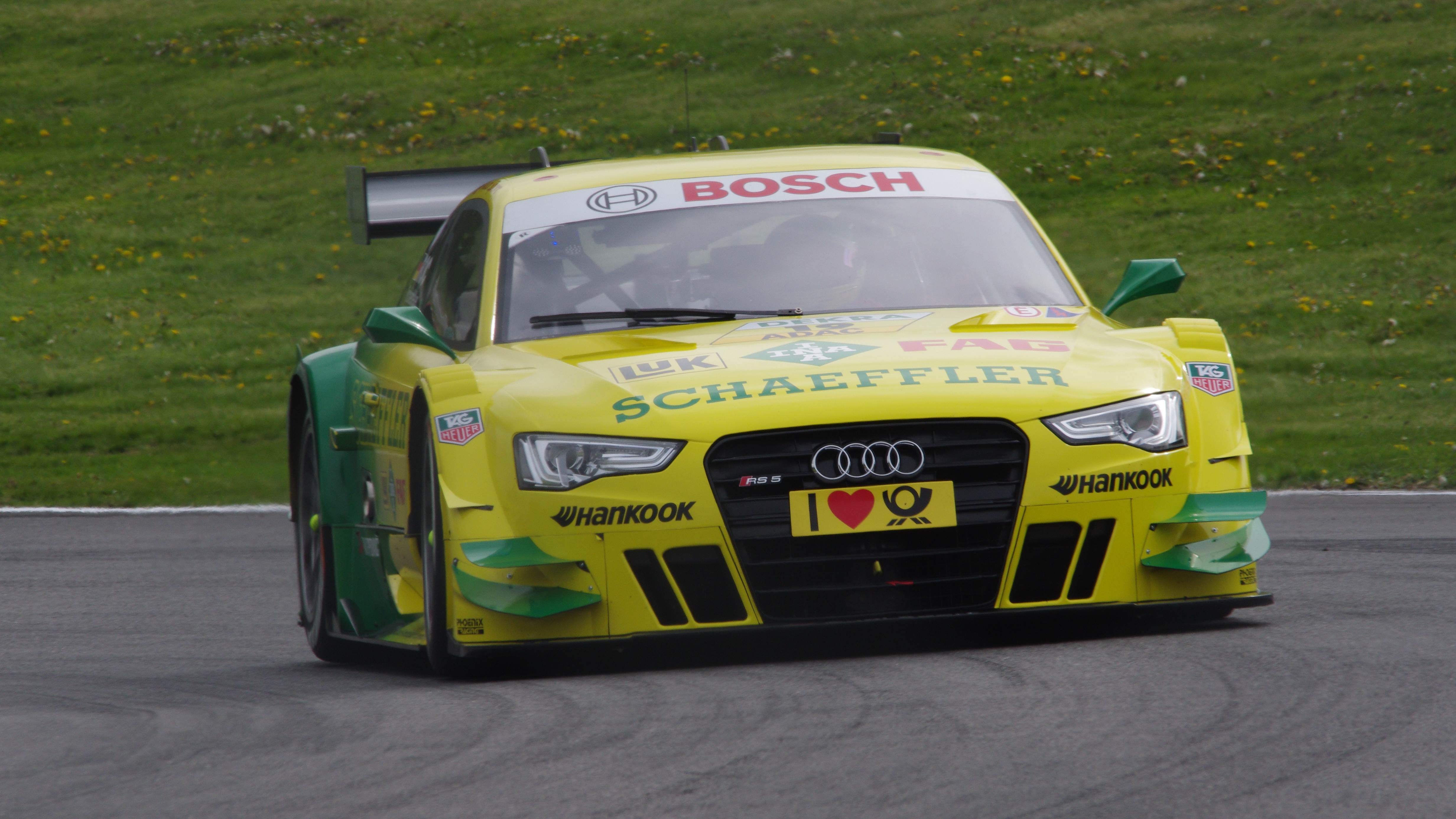 DTM Brands Hatch 2013 - #19 Mike Rockenfeller (GER), Audi RS5 DTM